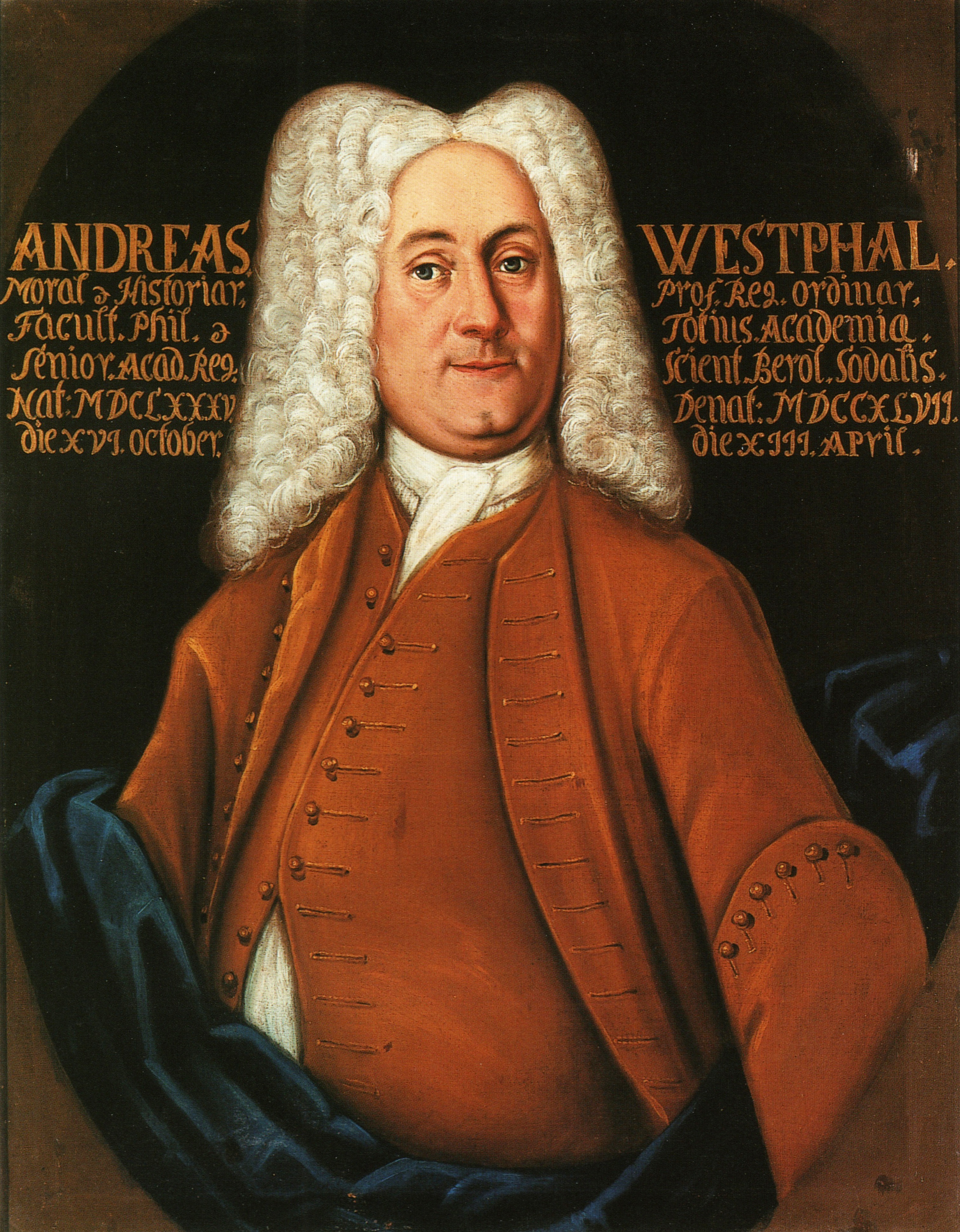 Ölgemälde von Andreas Westphal